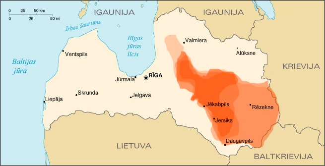 Jersikas (Letijas, Lotgolas) teritorijas variācijas 12.-13.gs. pēc dažādām vēstures kartēm.